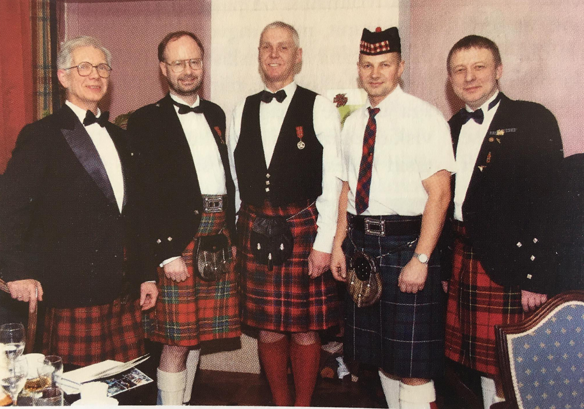 Andresepäeva tähistamine Šoti Klubis aastal 1996 - vasaklult: Kullo Vende, Chris McLean, Märt Mikkov, Kalle Talvi, Artur Raidmets